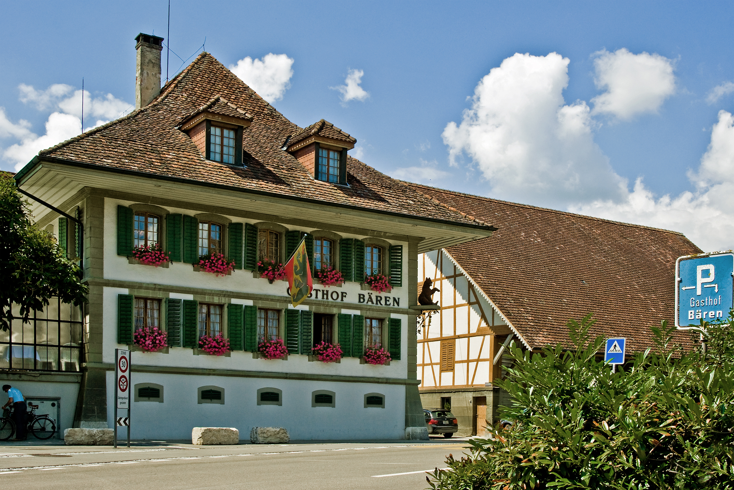 Gasthof Bären, Utzenstorf Kt. Bern, von der Strasse her